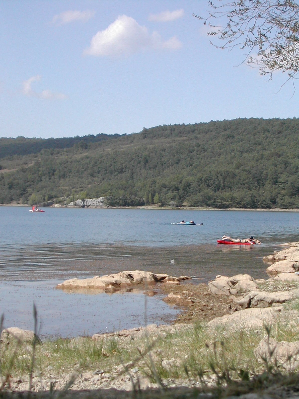 Embalse de Cervera (Palencia, España)